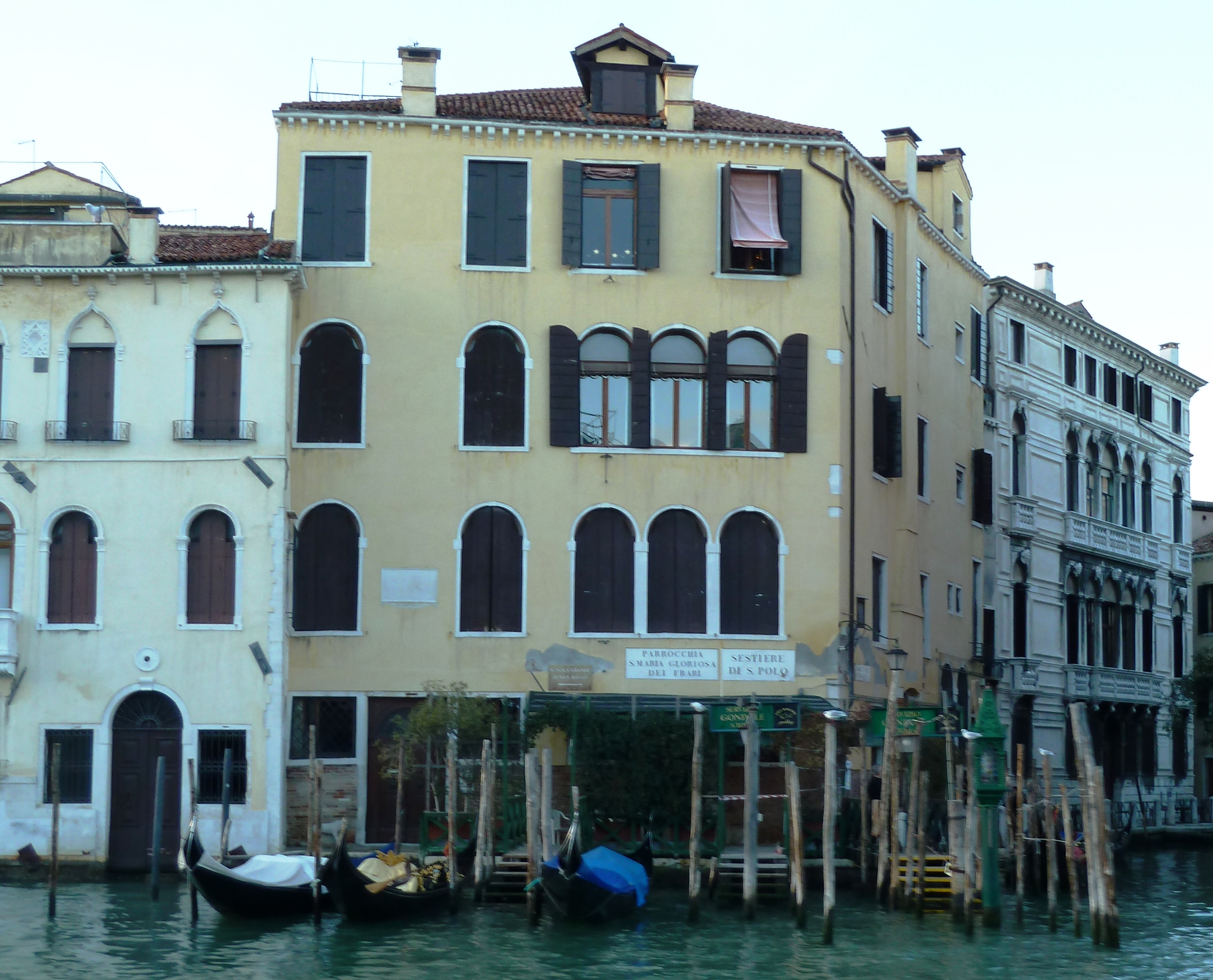 Pal marcello dei leoni destra gran canal